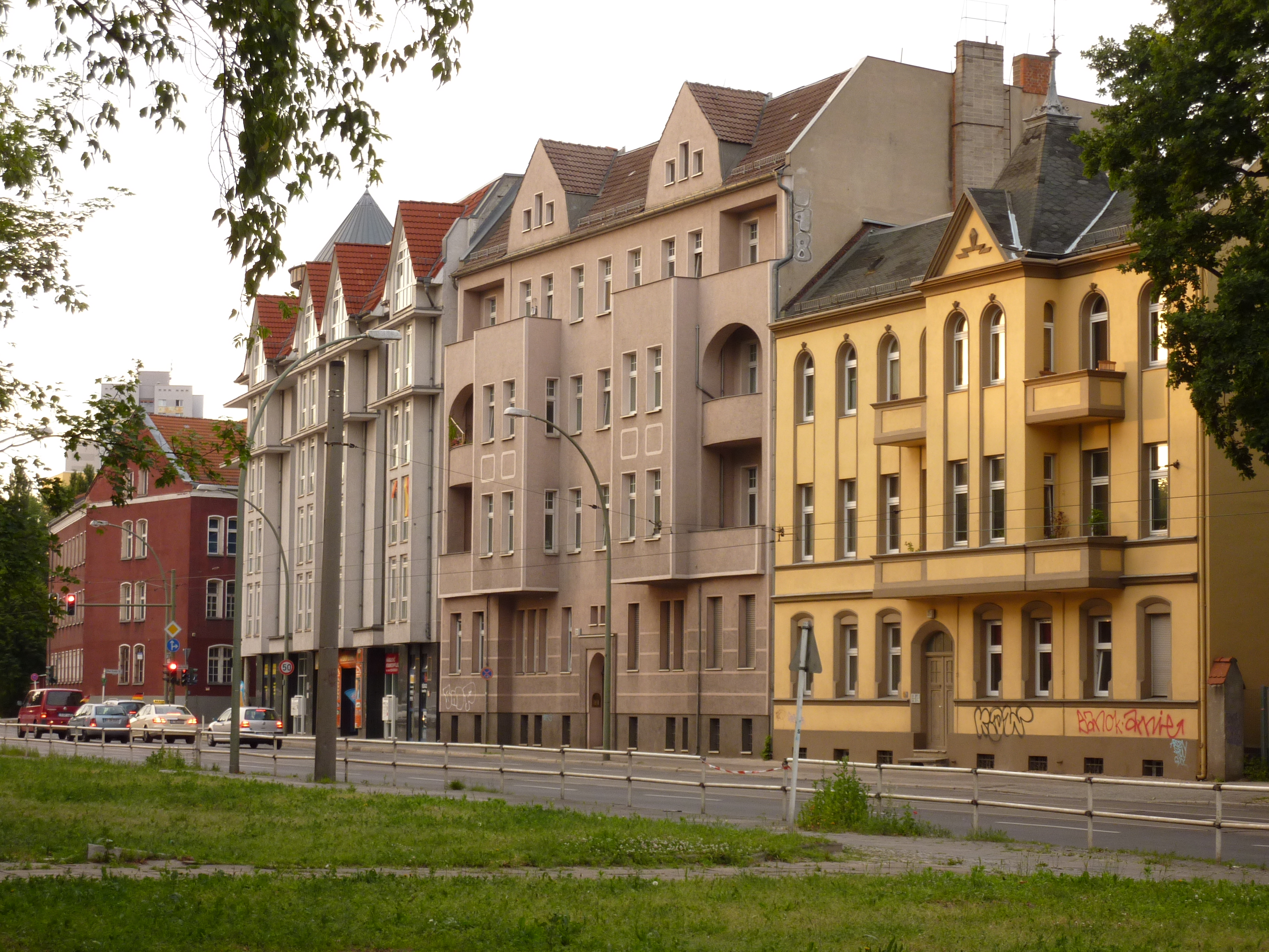 Ostseite der Straße Am Tierpark in Berlin-Friedrichsfelde, nördlich und südlich der Alfred-Kowalke-Straße.